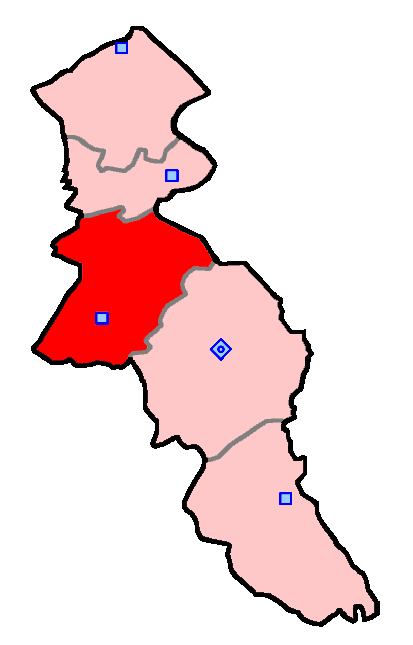 حوزهٔ انتخاباتی مشکین‌شهر برای انتخابات مجلس شورای اسلامی